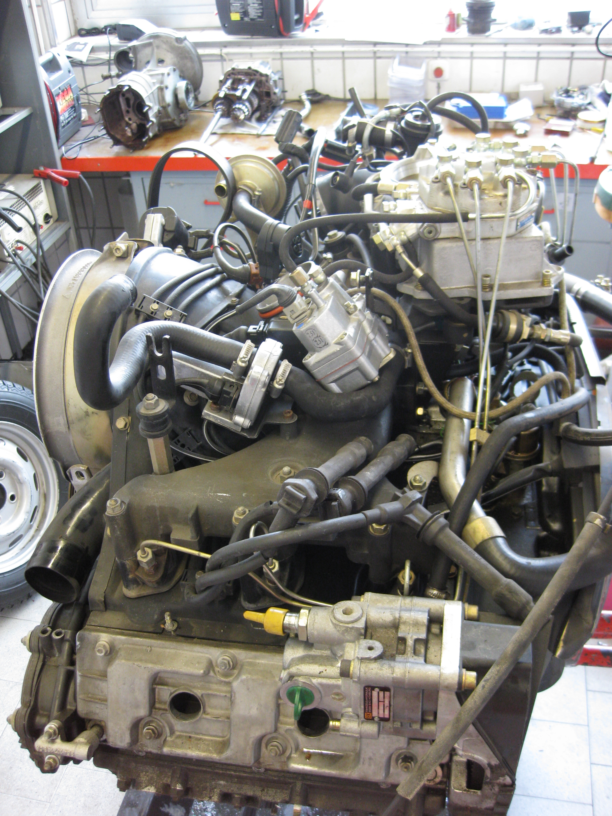 Porsche 6-Zylinder-Motor ausgebaut